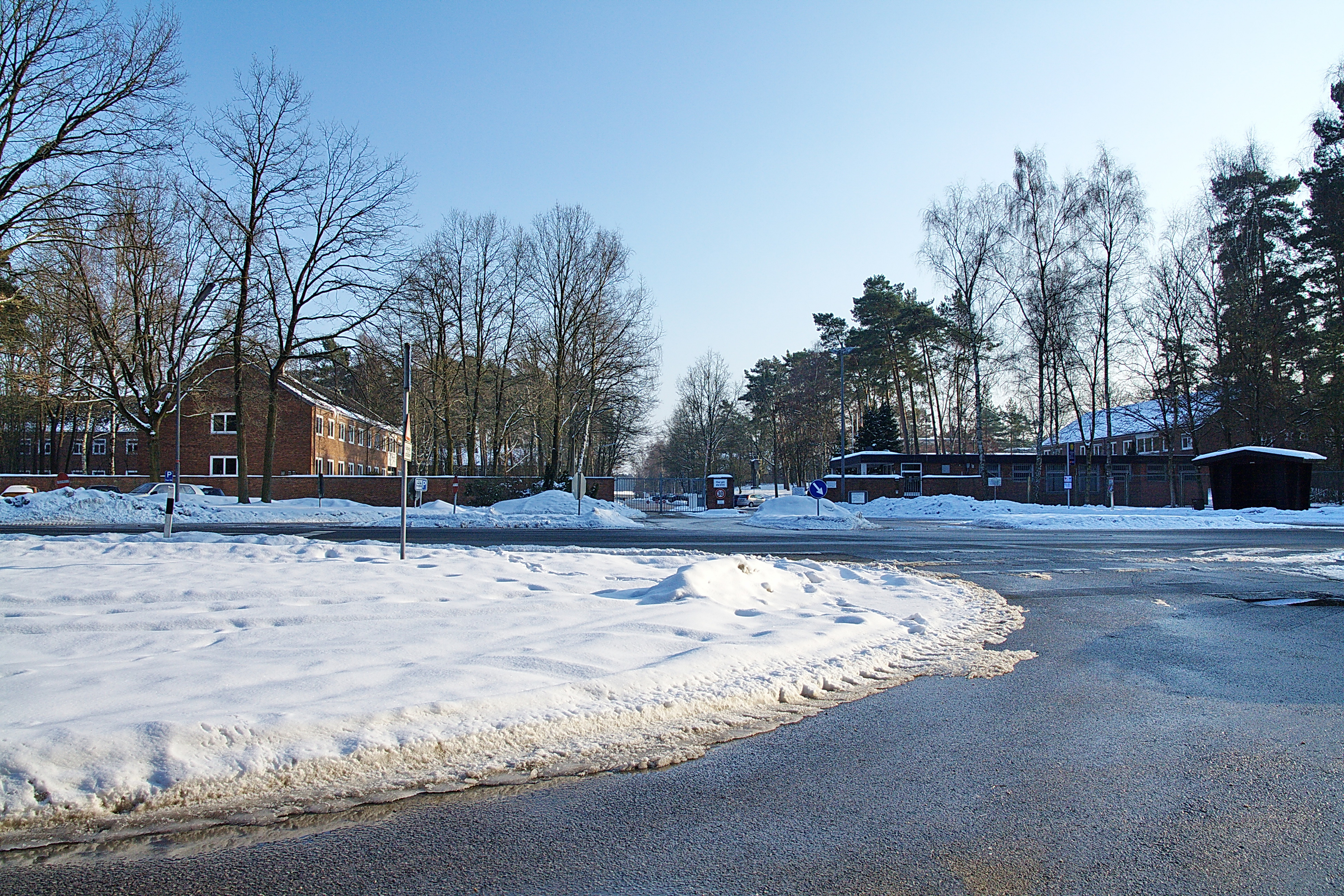 Blick auf Wilhelmstein-Kaserne in Luttmersen (Neustadt am Rübenberge)), Niedersachsen, Deutschland